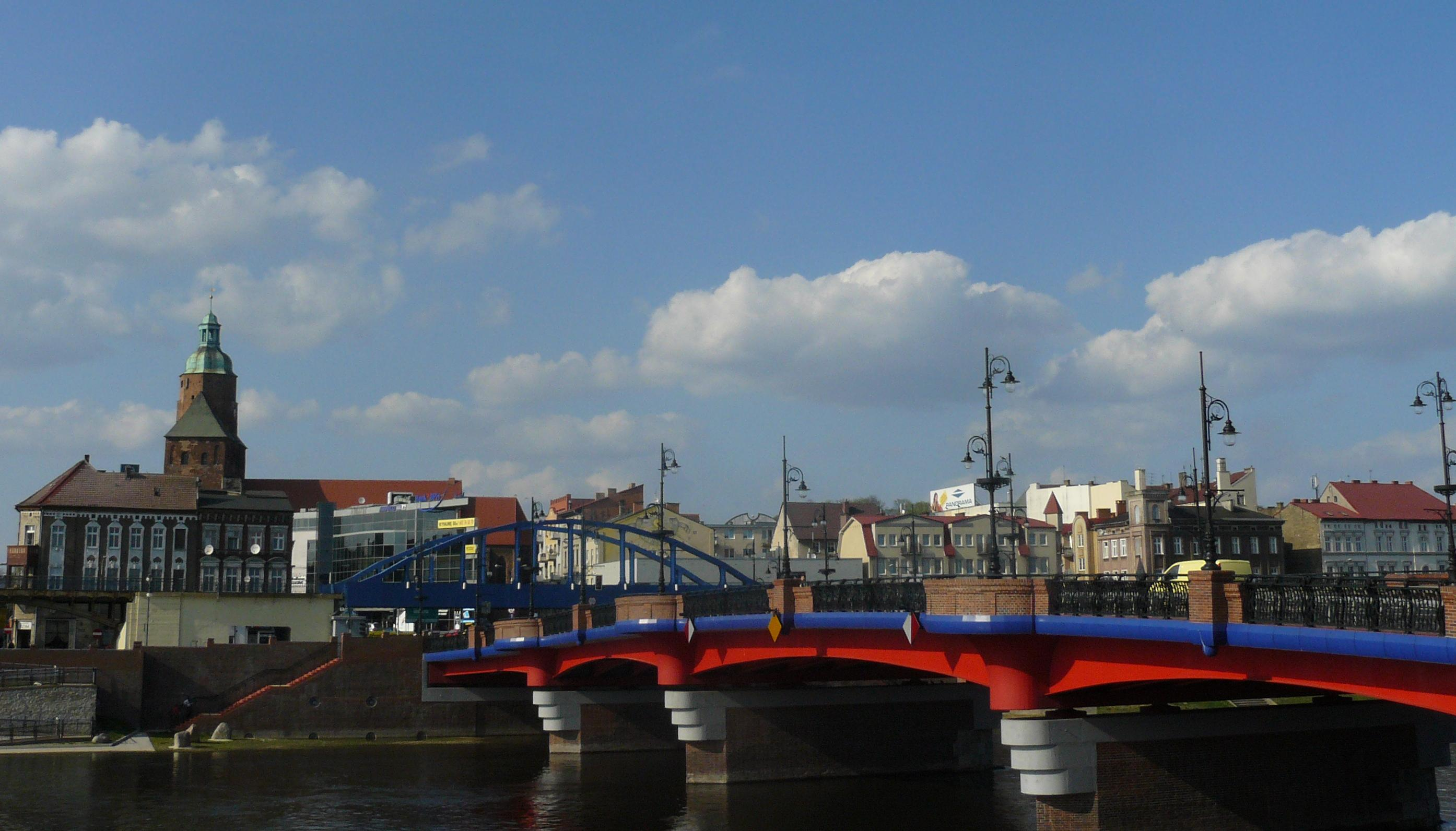 Panorama Gorzowa z drugiej strony rzeki